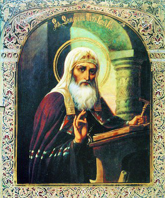 Свщмч. Ермоген, Патриарх Московский и всея Руси. Икона. 10-е гг. ХХ в. (ГМИР)